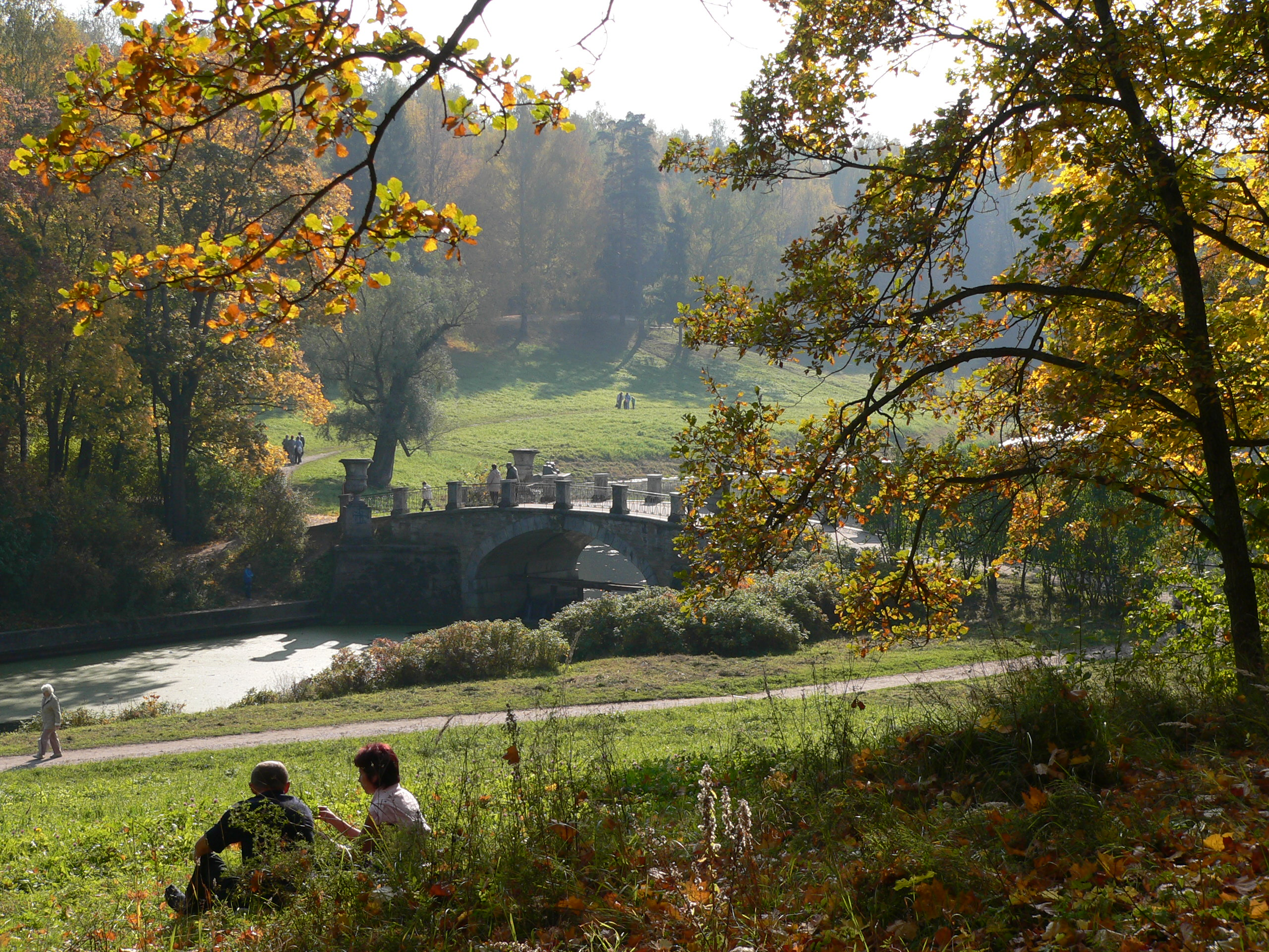 Висконтьев мост через Славянку в Павловском парке.